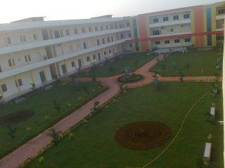 K.s.s.w Eng College, Burripalem Road Tenali.